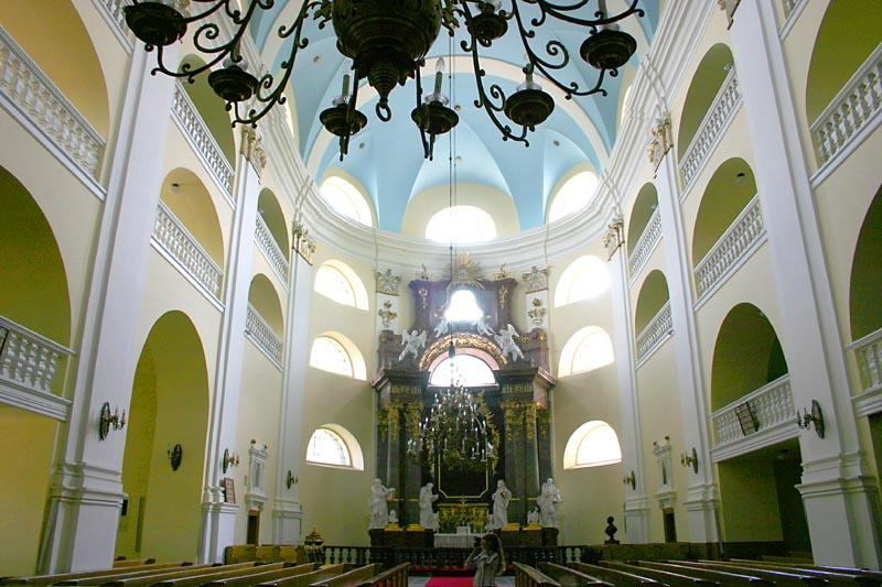 Interiér Ježíšova kostela v polském Těšíně (Cieszynie), největší sakrální stavby na Těšínsku. Interiér kostela milosti v Těšíně.